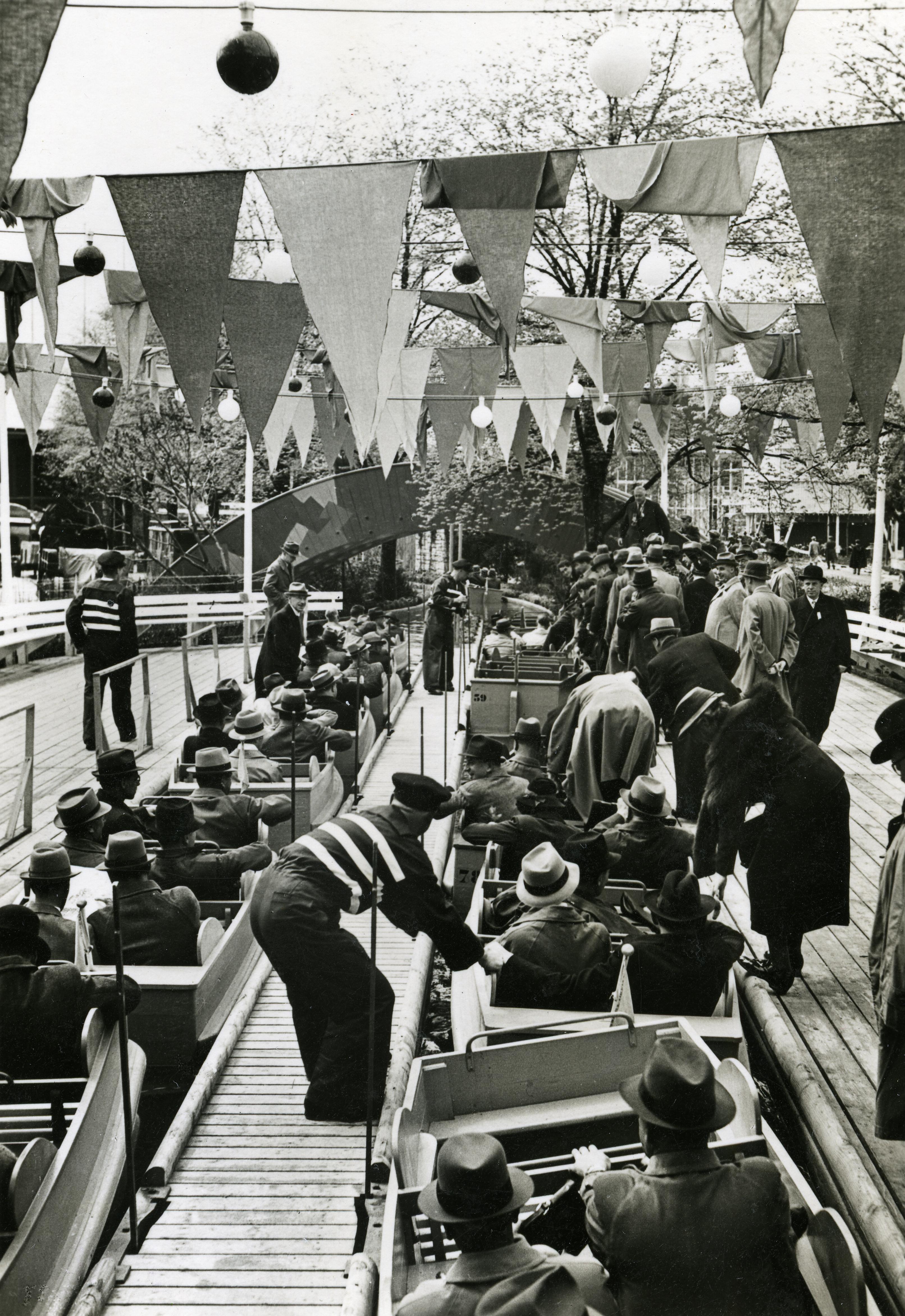 Landesausstellung 1939 in Zürich, Schweiz